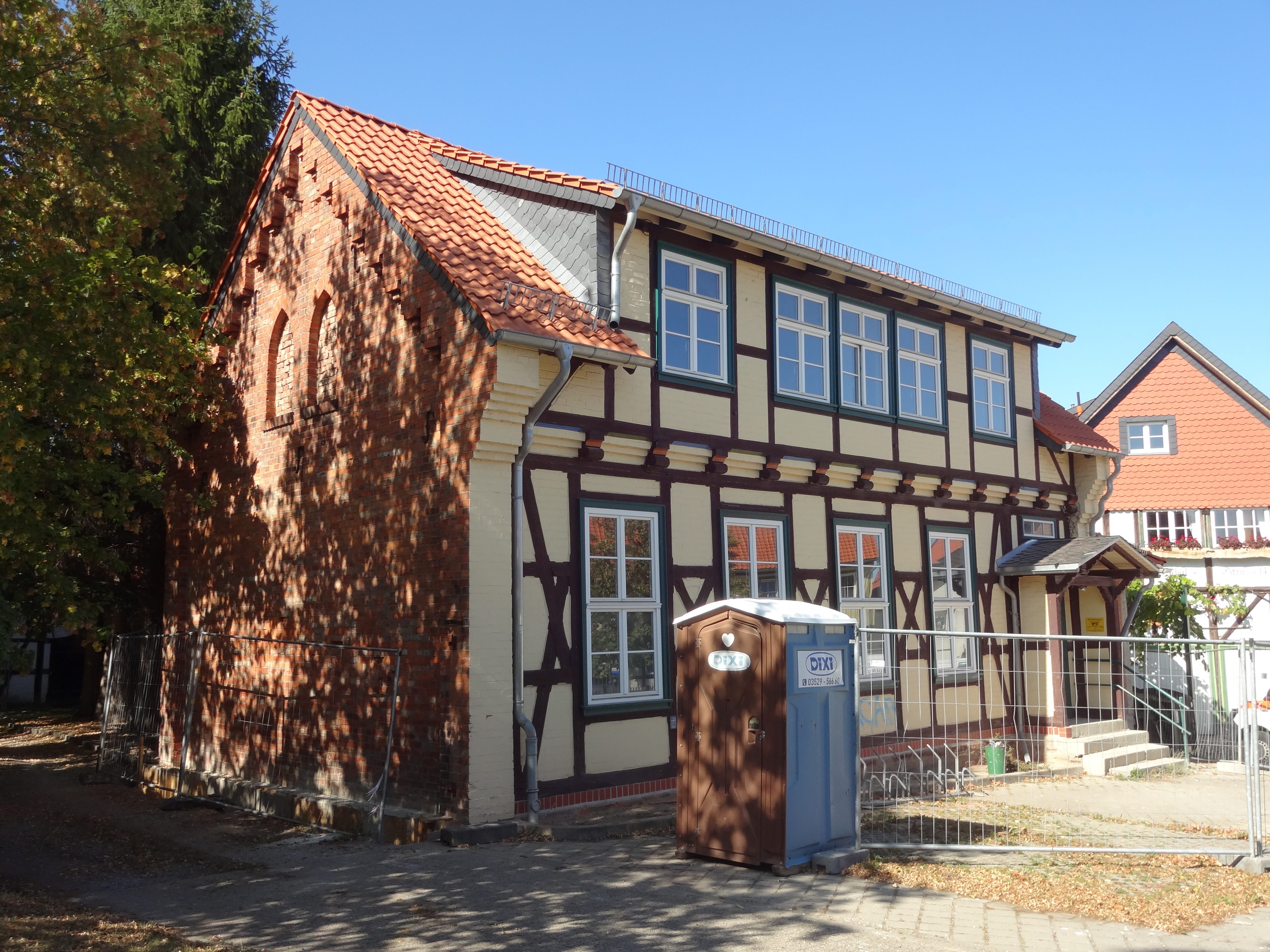 denkmalgeschützte Schule in der Schulstraße 12a in Drübeck